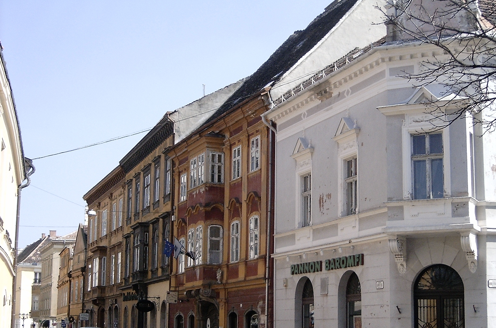 A győri Kazinczy utca déli házai (Győr-Moson-Sopron megye)